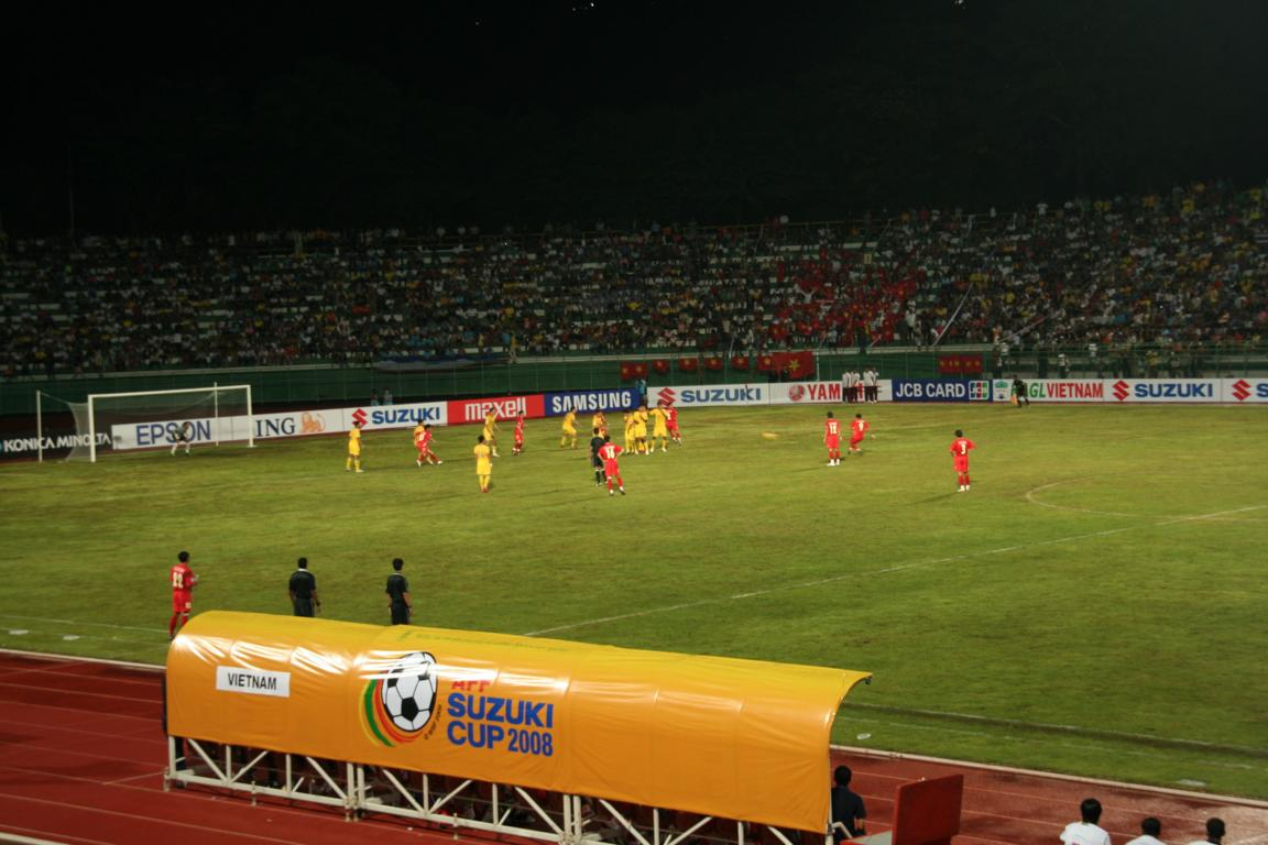 AFF Suzuki Cup 2009